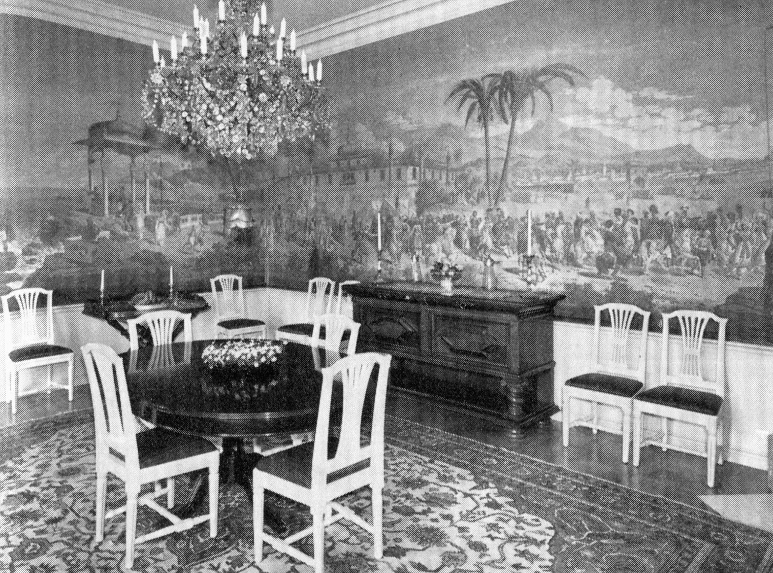 Stäringe herrgård, salong